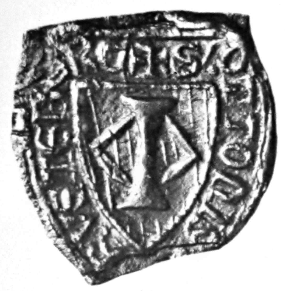 Siegel des Otto von Rusteberg (1339) (S' OTTONIS....RUSTEB[E]RC) In: Otto Posse: Die Siegel des Adels der Wettiner Lande. Band V, Verlag Baensch Stiftung Dresden 1917, Tafel 40. Nr. 10